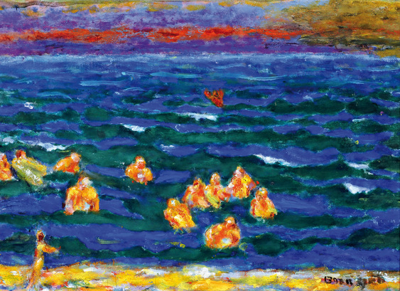 Painting by Pierre Bonnard